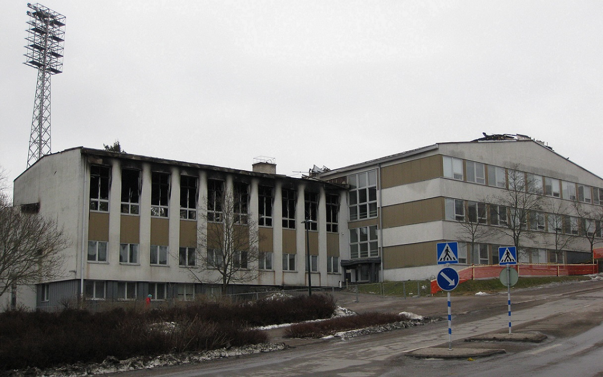 Kouvolan yhteiskoulu palon jälkeen 25. helmikuuta 2014.